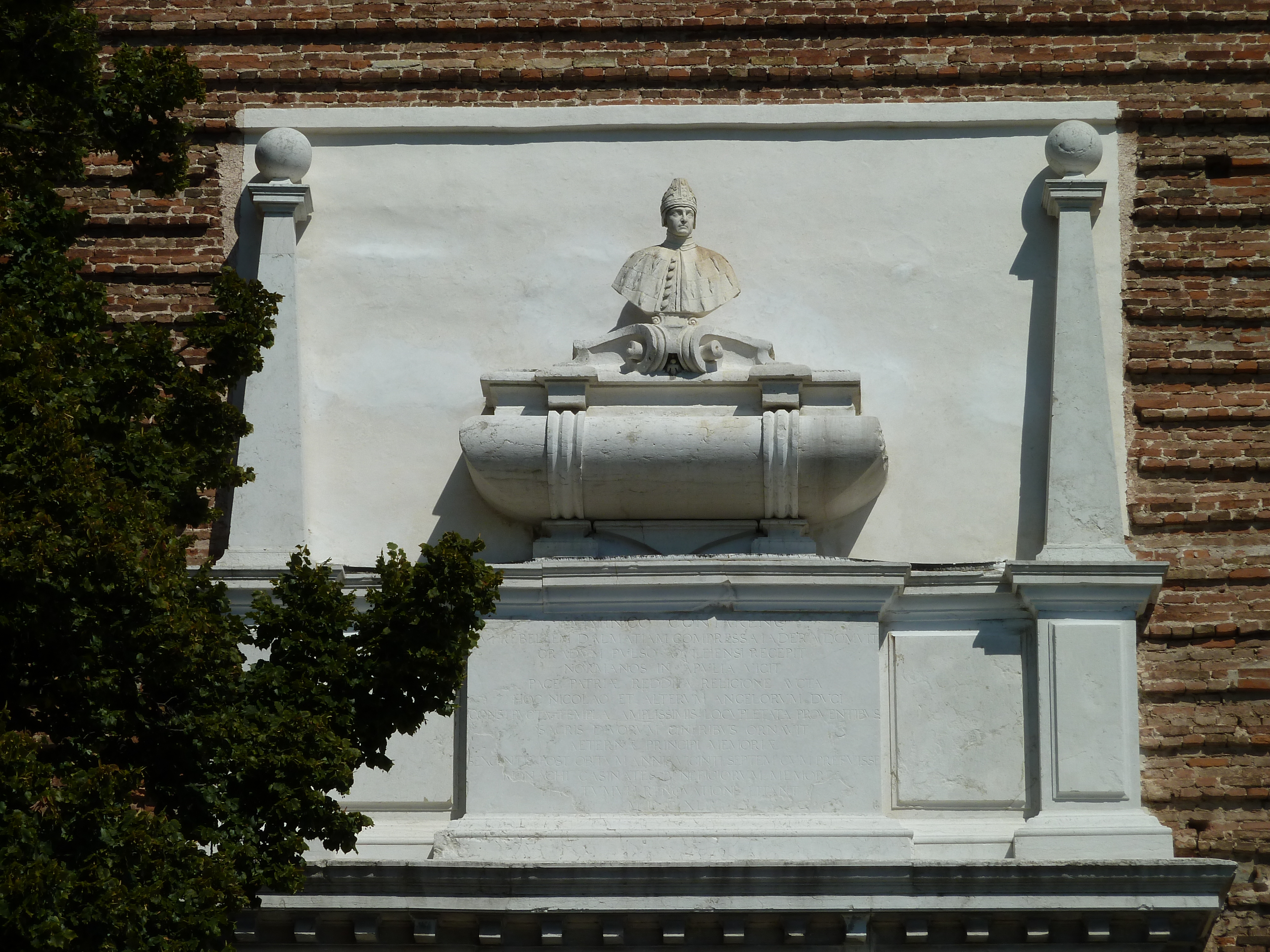 San Nicolò (Venice)